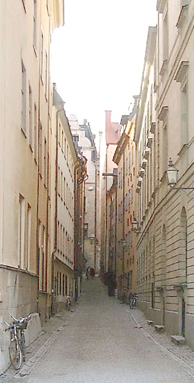 Skottgränd, Gamla stan, Stockholm.